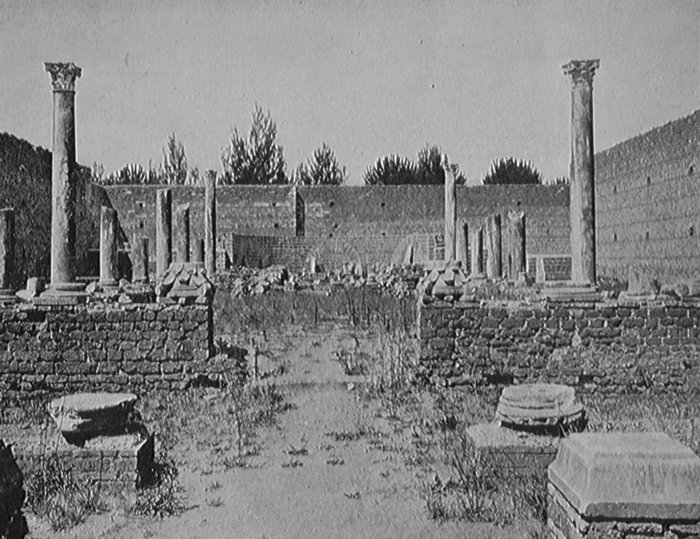 Reste der Basilica di Santo Stefano in Via Latina, Grabungs- und Rekonstruktionszustand 1911